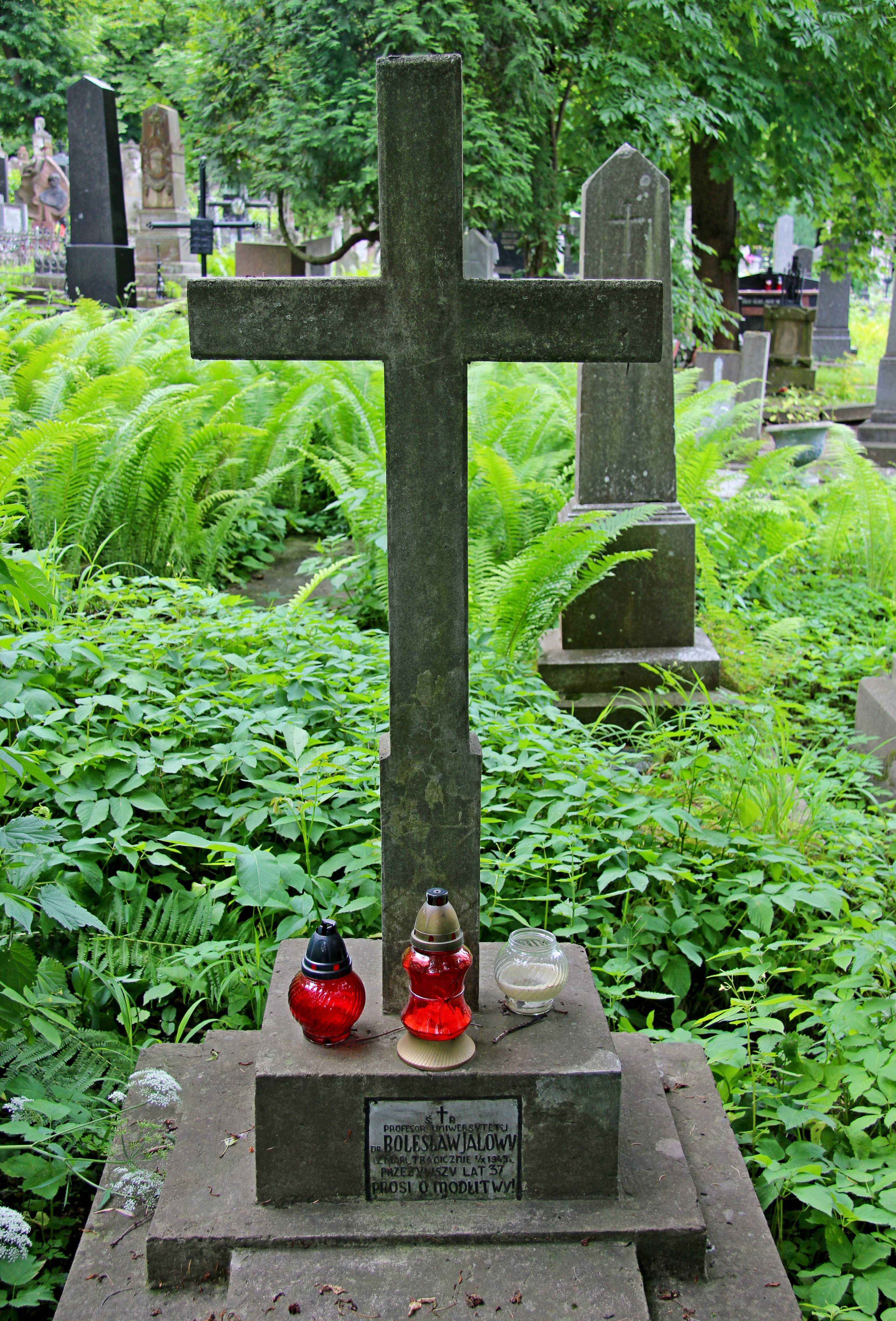 Могила Б. Ялового.Личаківський цвинтар , поле № 13.